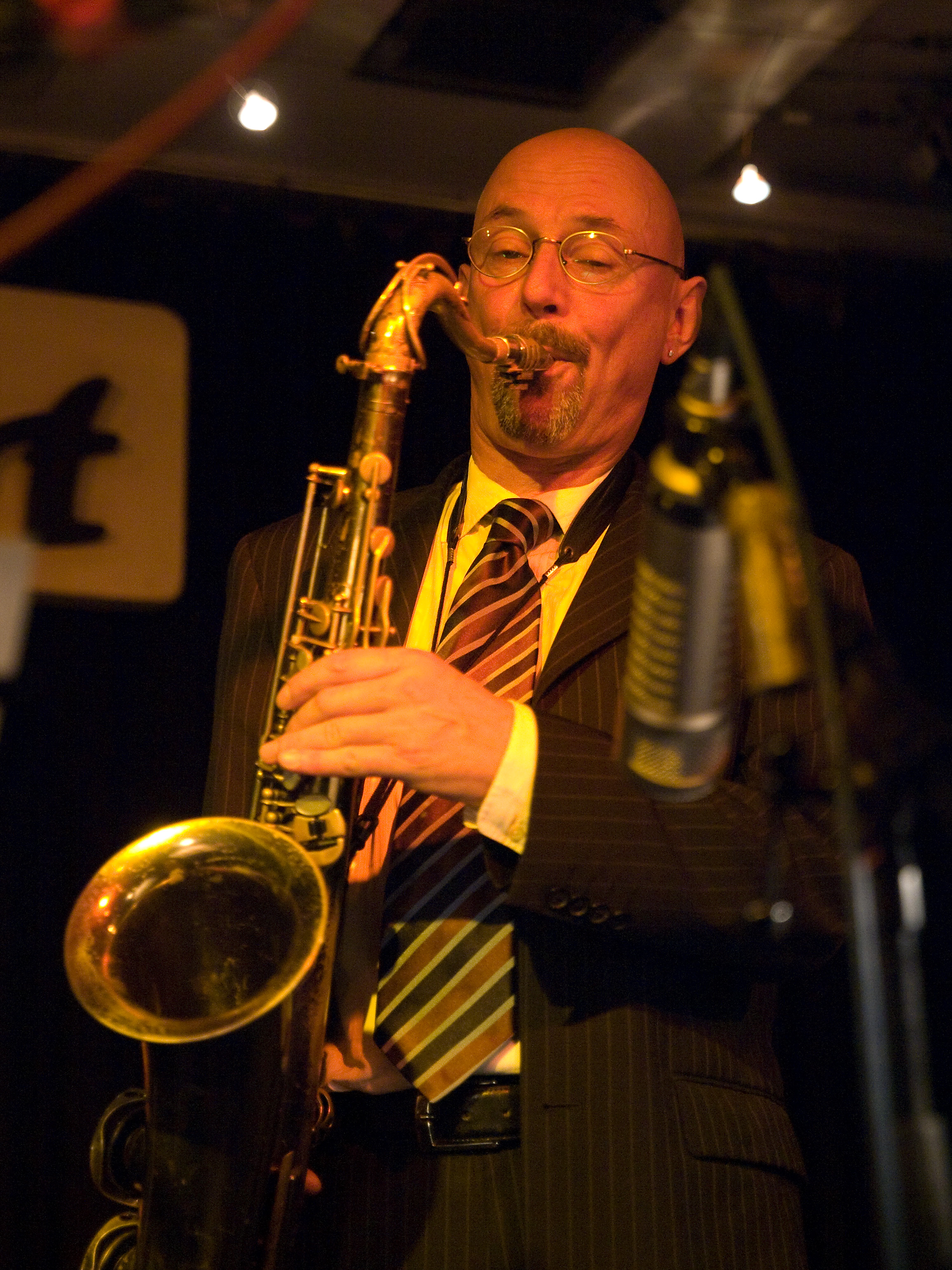 Roman Schwaller, jazz saxophonist, picture taken in Jazz club "Unterfahrt" in Munich/Germany